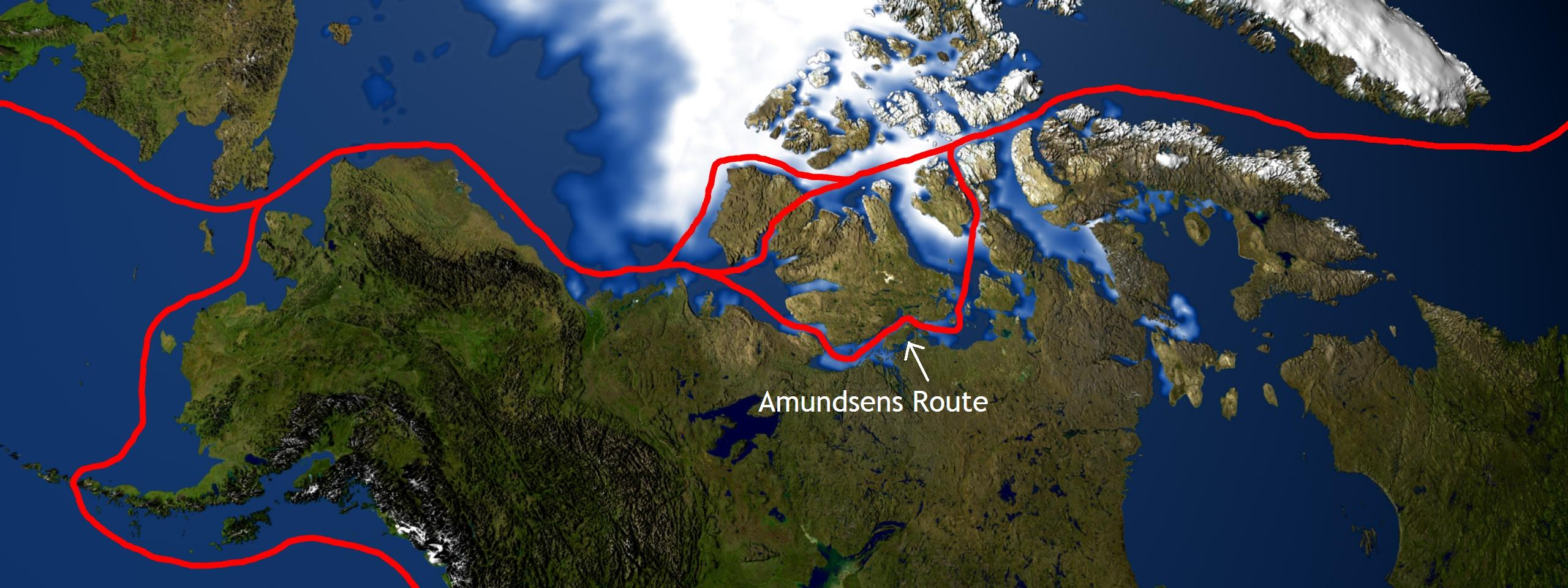 Beschreibung wie File:Northwest passage.jpg, nur hier mit Schriftzug. Popular Northwest Passage routes.